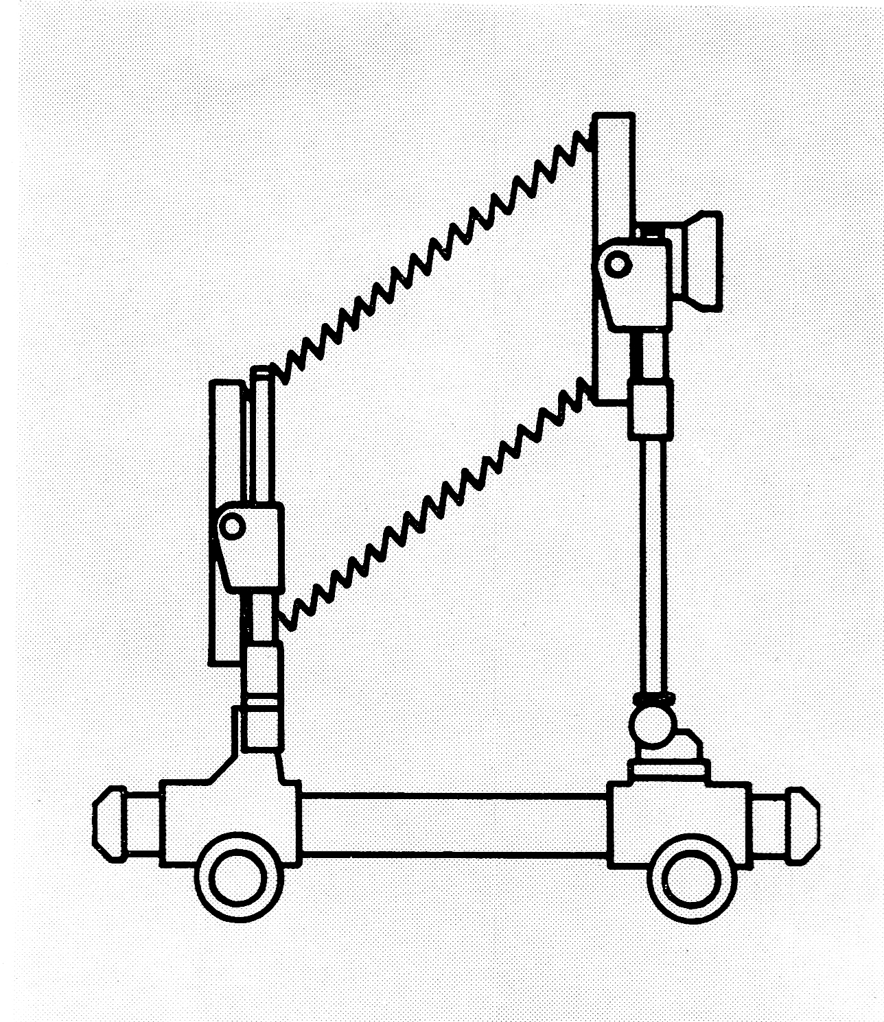 Parallelverschiebung an einer Großformatkamera